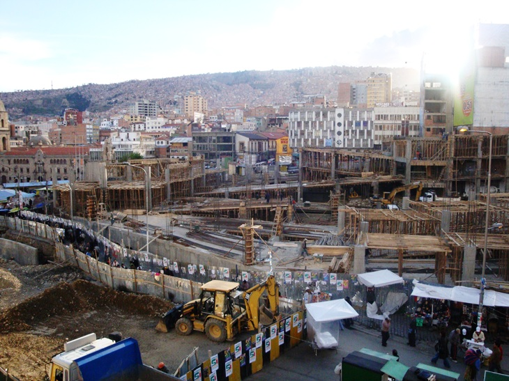 Fotografía de las obras realizadas para la construcción del Nuevo mercado Lanza durante 2009